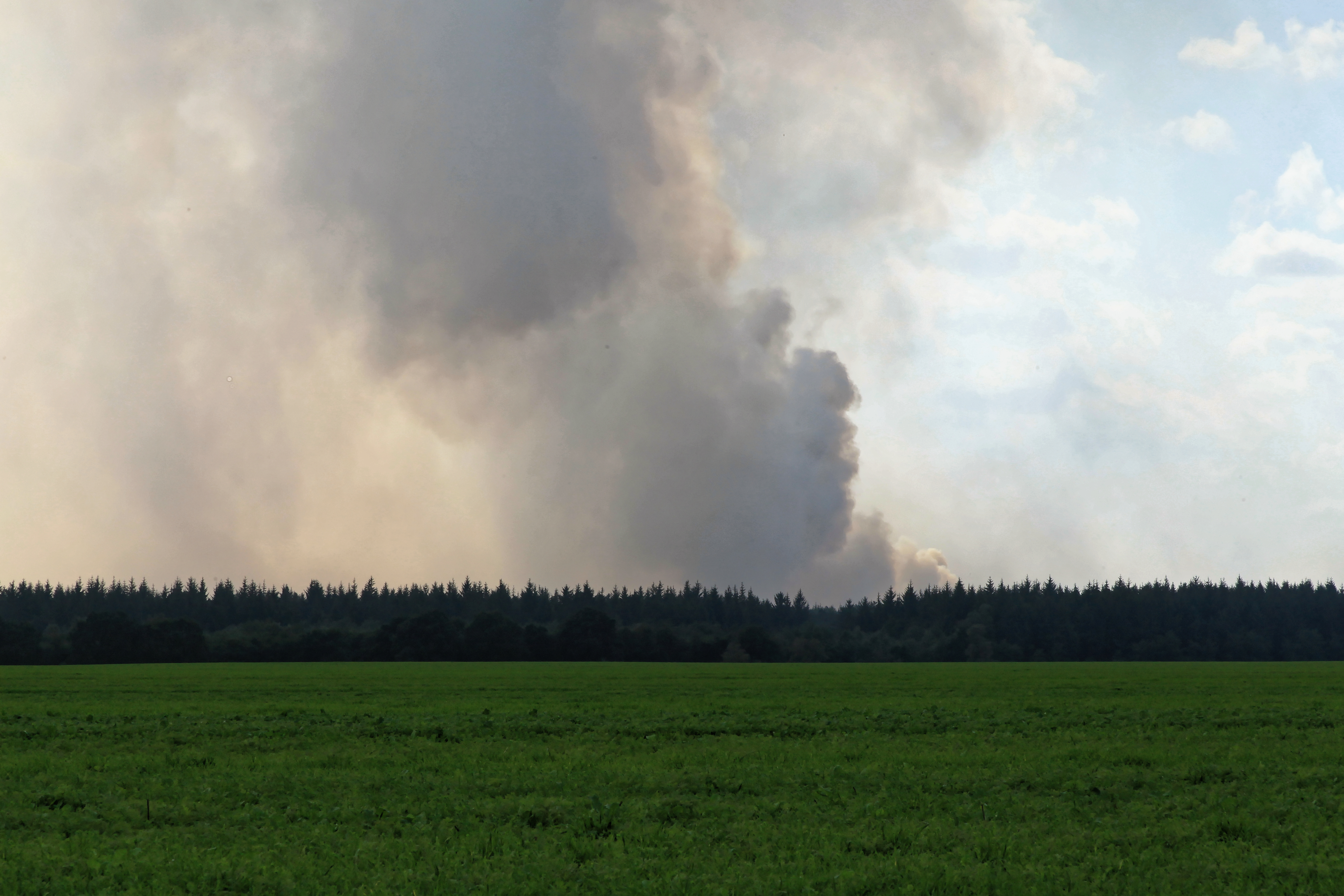 Qualmwolke vom Großbrand im NSG Tinner Dose-Sprakeler Heide auf dem Schießplatz Meppen Mitte September 2018, hier über den Feldern an der L53 in Sögel.